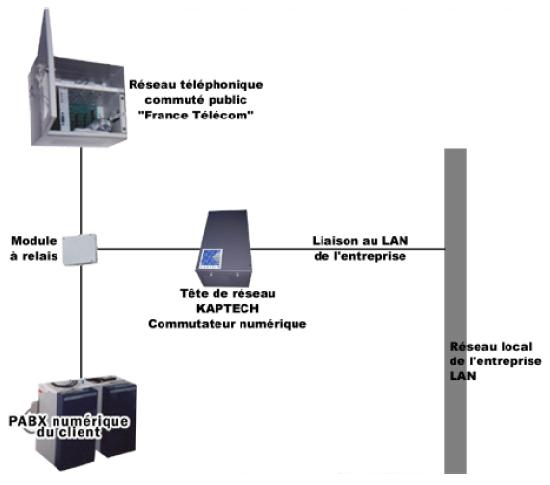 Schéma de raccordement des têtes de reseau Kaptech